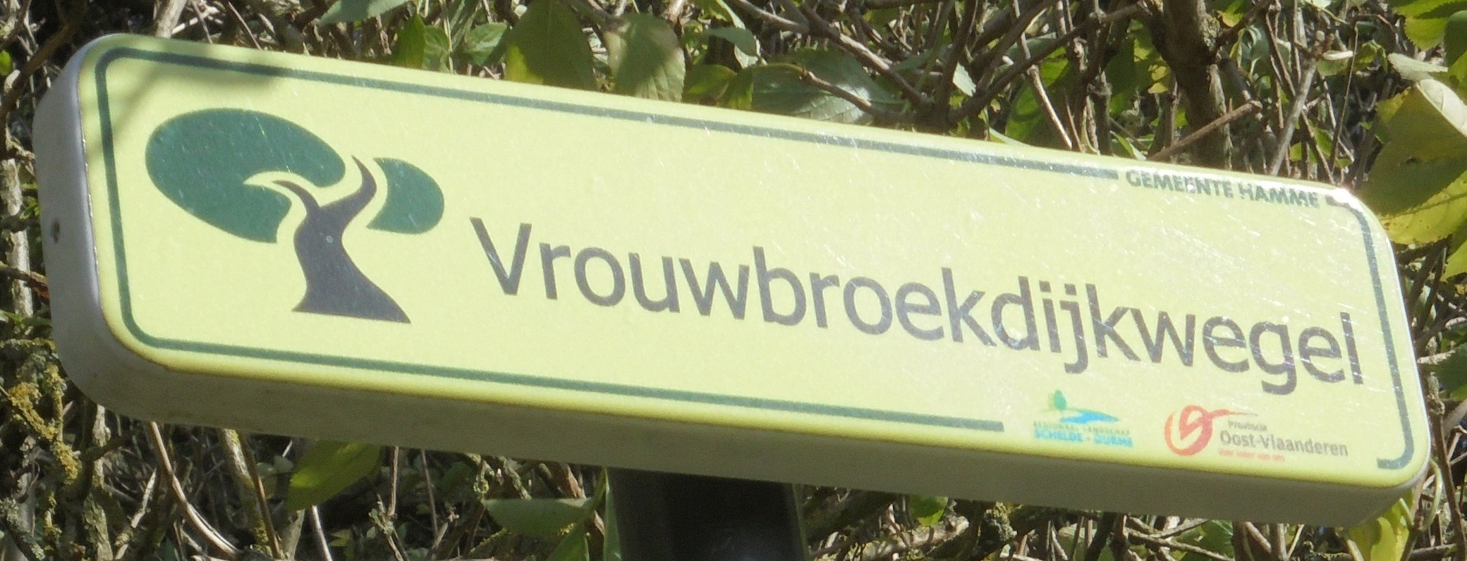 Vrouwbroekdijkwegel - Hamme - Oost-Vlaanderen - België